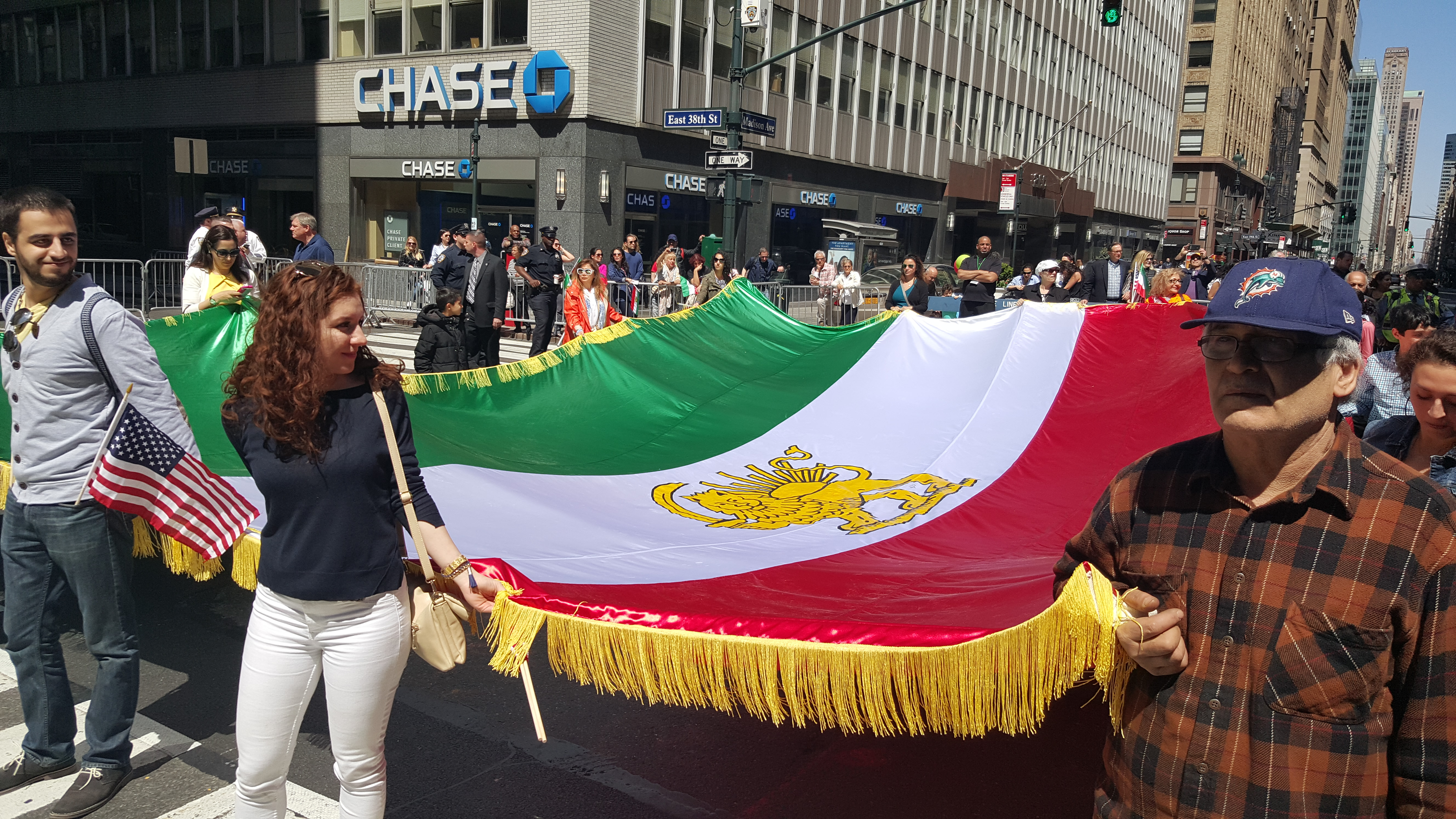 Shirekhorshid Persian Flag